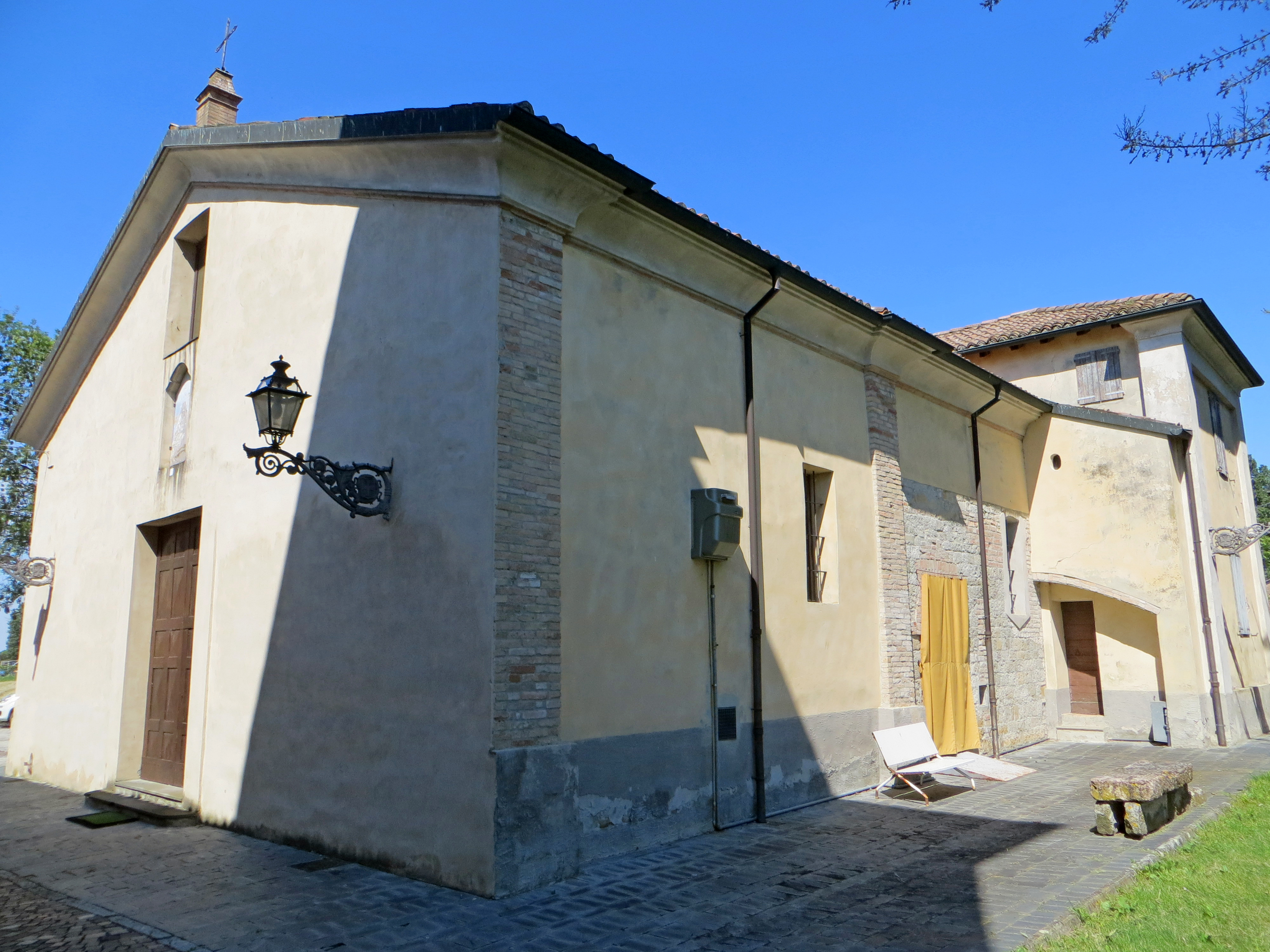 Chiesa di San Giovanni Evangelista (Castelnovo - Parma) - facciata e lato sud